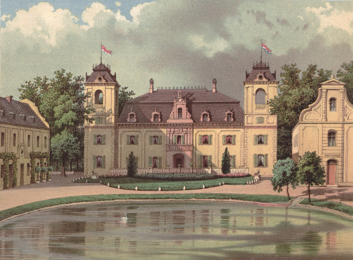 Burg Flamersheim, Kreis Rheinbach